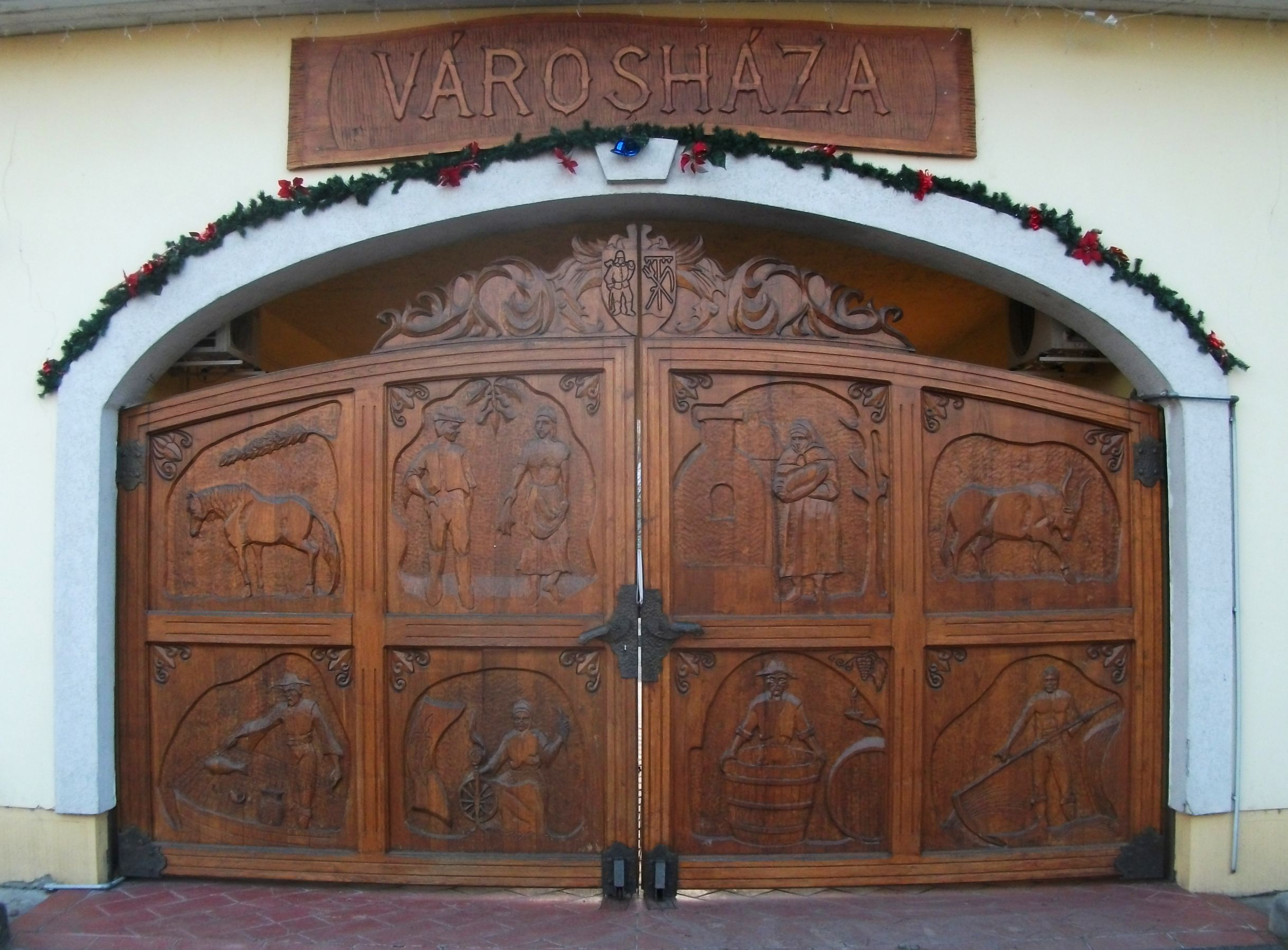 Cigánd Városháza 2000-ben készült faragott főkapuja (2013)